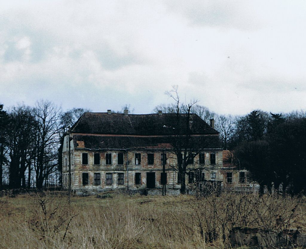 Łoźnica - pałac